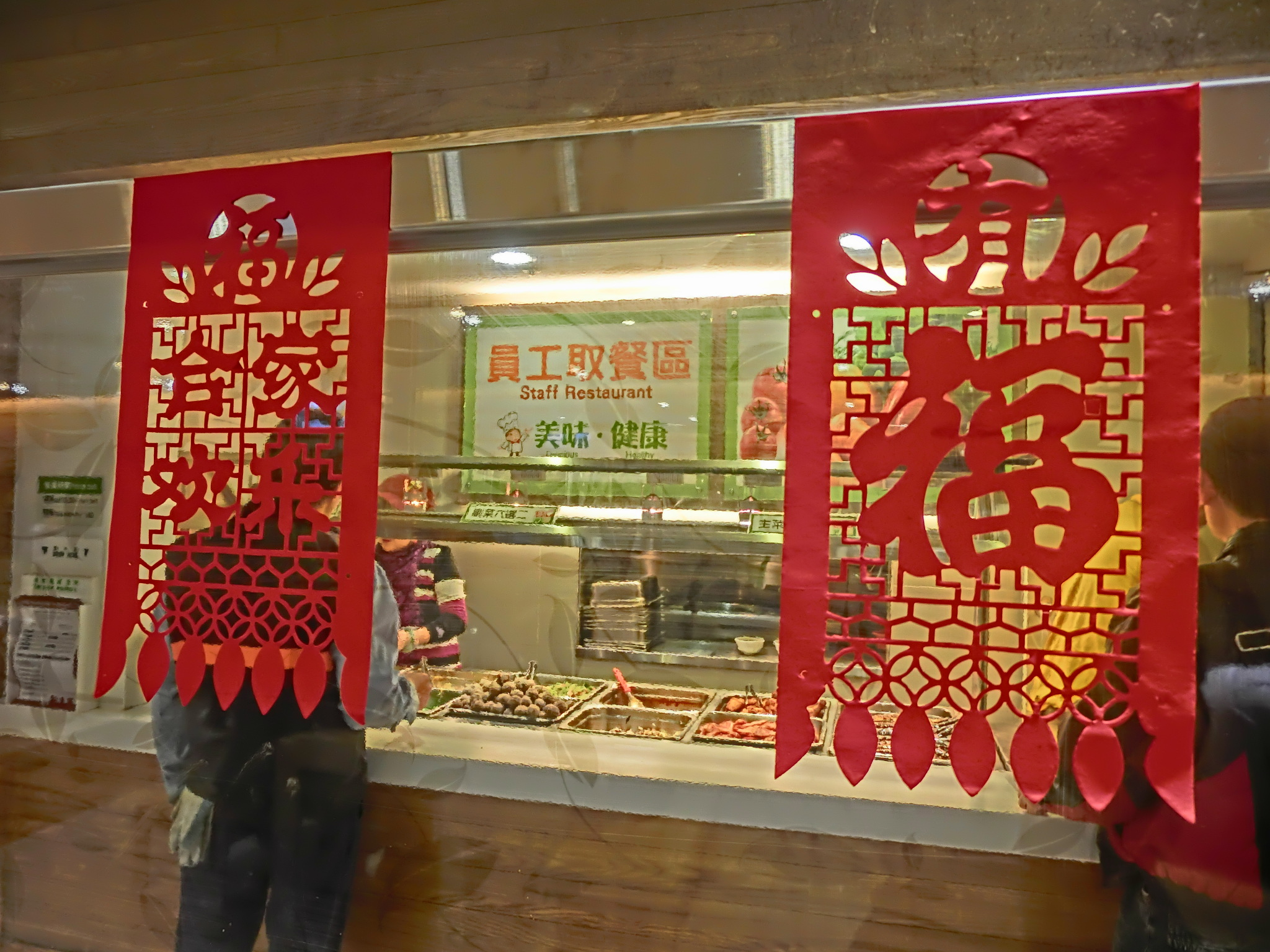 臺灣桃園國際機場美食街員工取餐區。